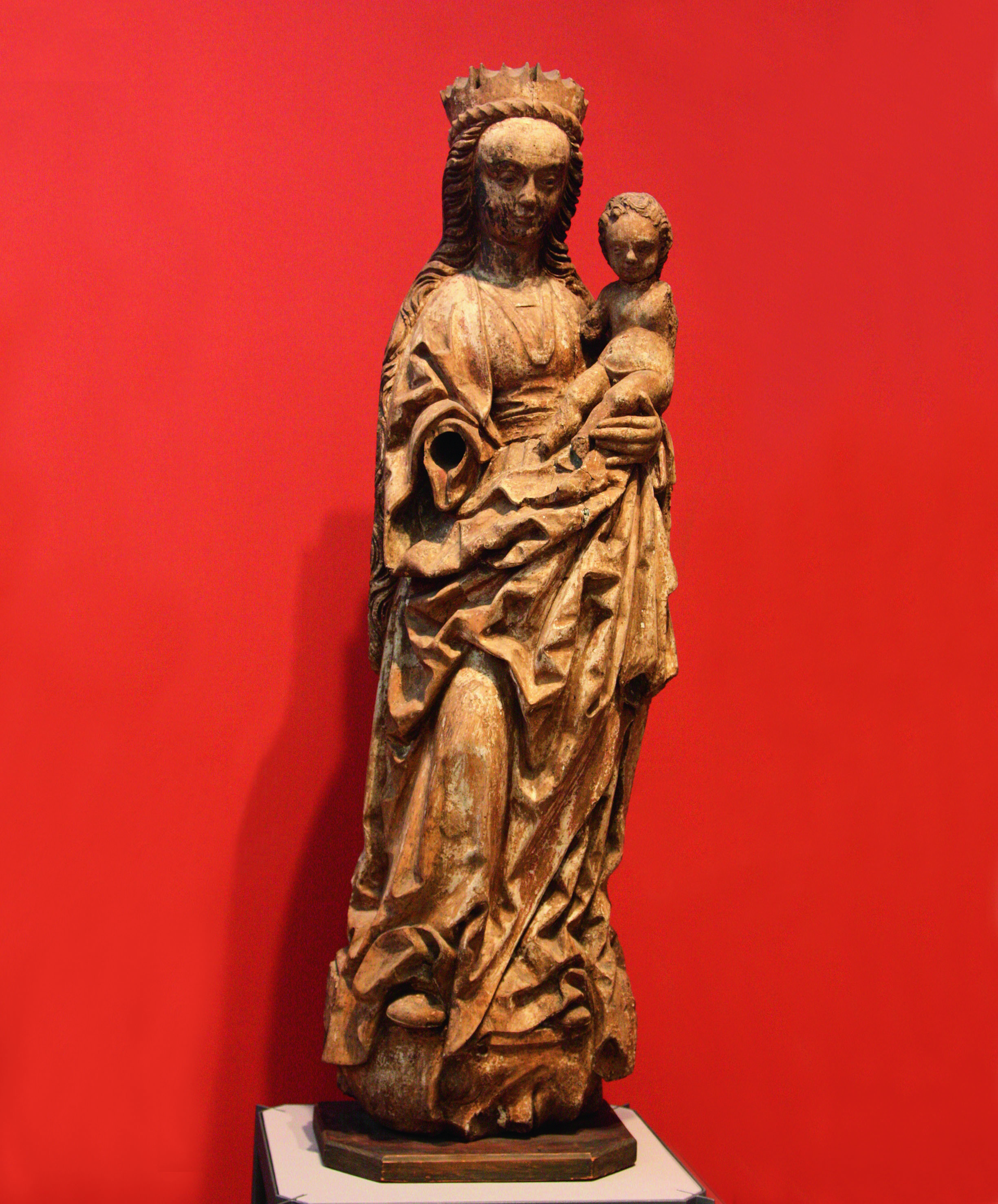 Werkstatt des Meisters von Osnabrück Maria mit Kind (sogenannte Mondsichel-Madonna oder Winser Madonna) Spätes 15. Jahrhundert Lindenholz, 127 x 41 x 27 cm Sammlung Würth, Künzelsau, Inv. 9015 Foto: Eva Maria Kraiss, Schwäbisch Hall